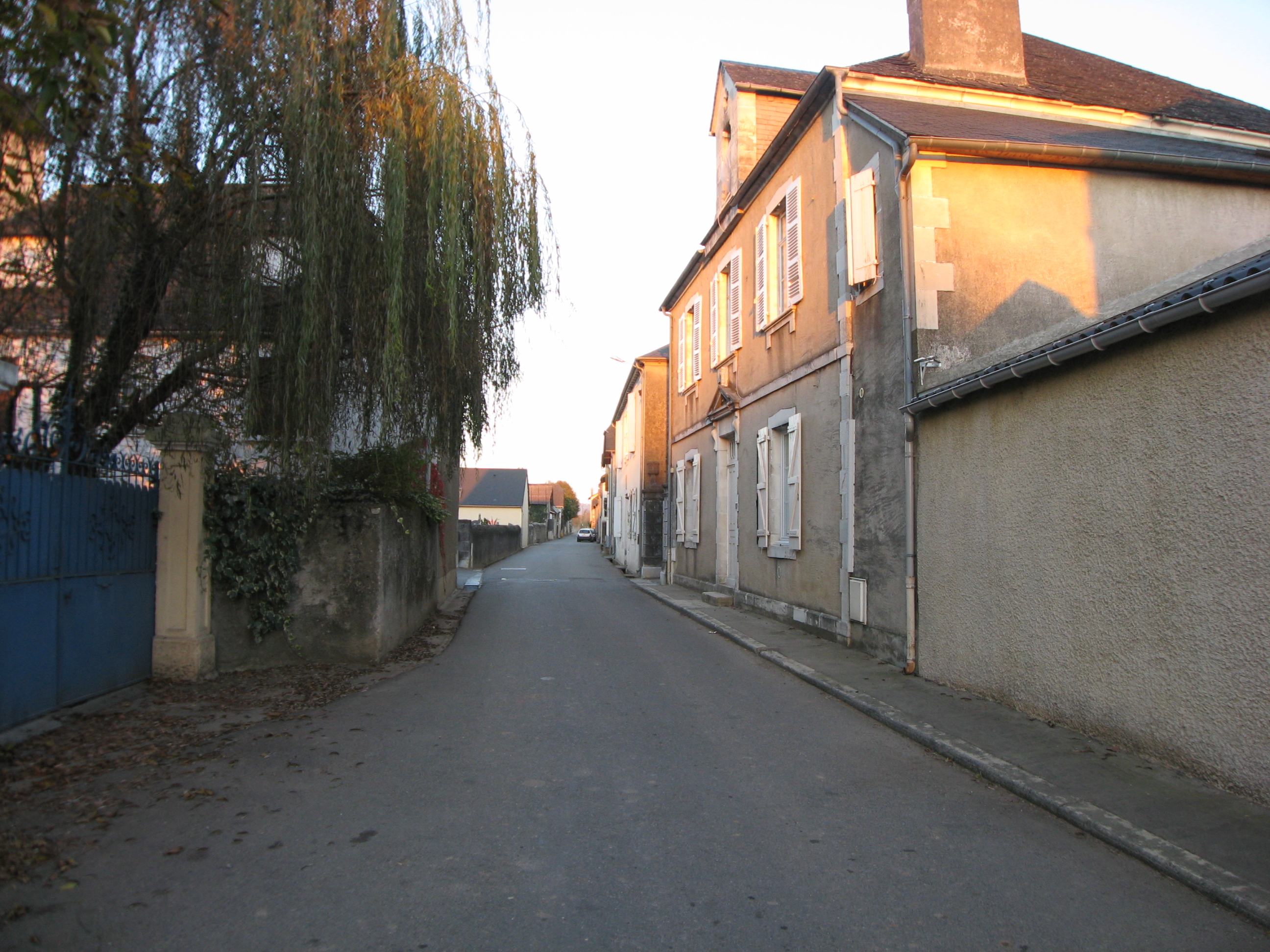 Rue de l'église à Pardies-Pietat (Pyrénées).